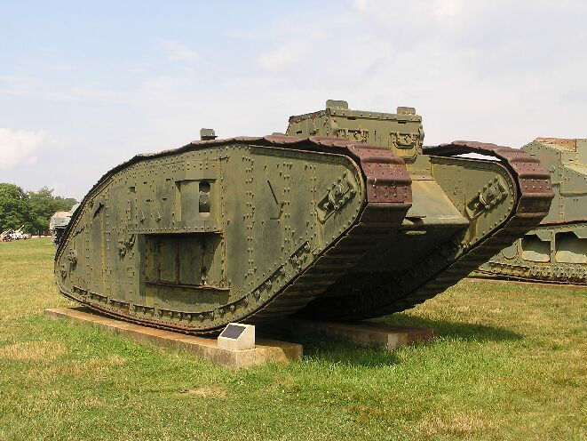 Mark IV